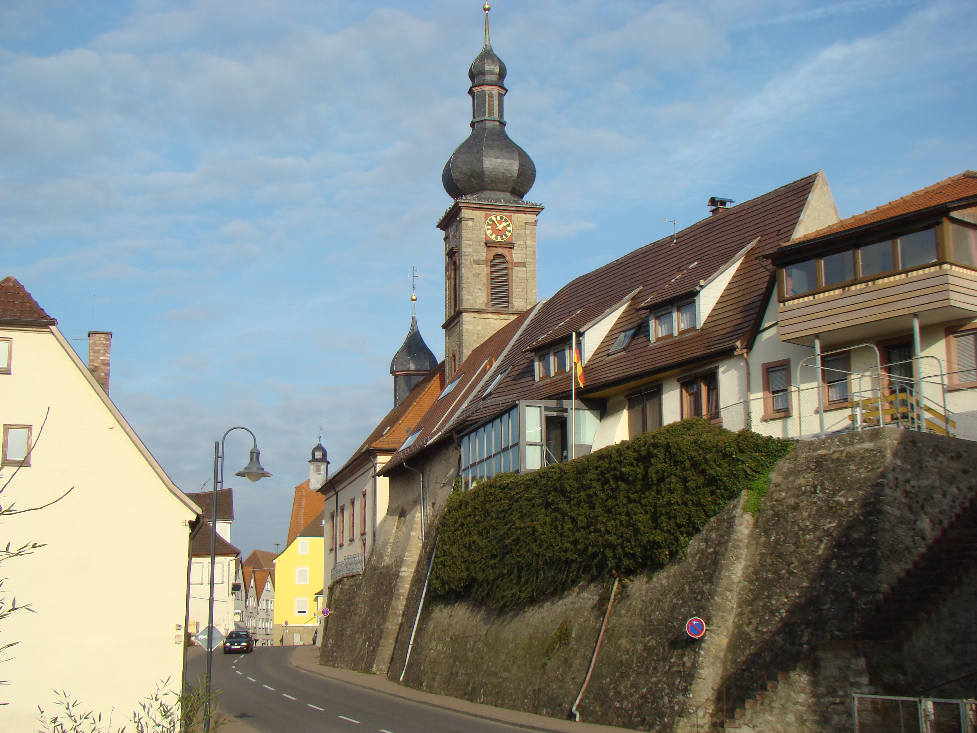 Boxberg (Baden), St. Aquilinus